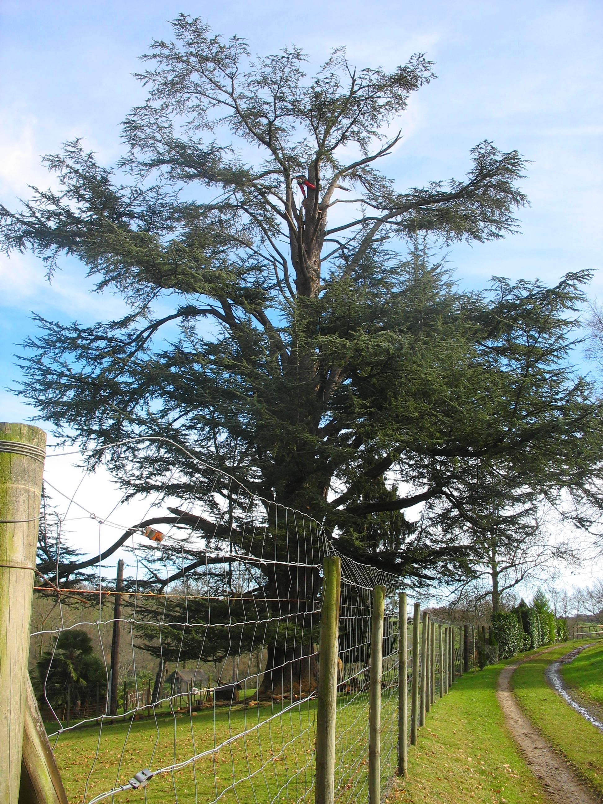 Elagage d'un cèdre de 250 ans après une tempête. Pyrénées-Atlantiques, France